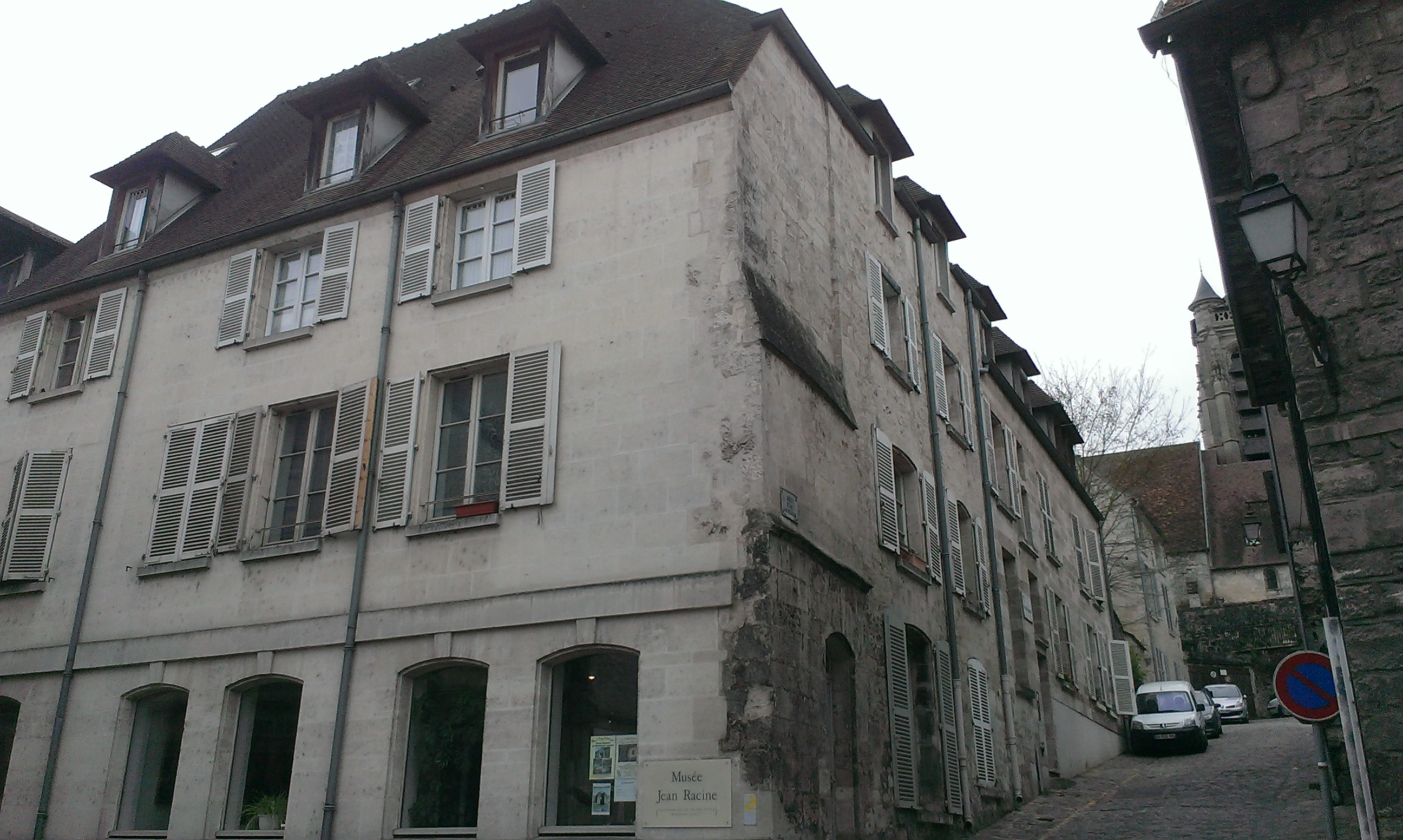 Maison Jean-Racine à La Ferté-Milon (02)